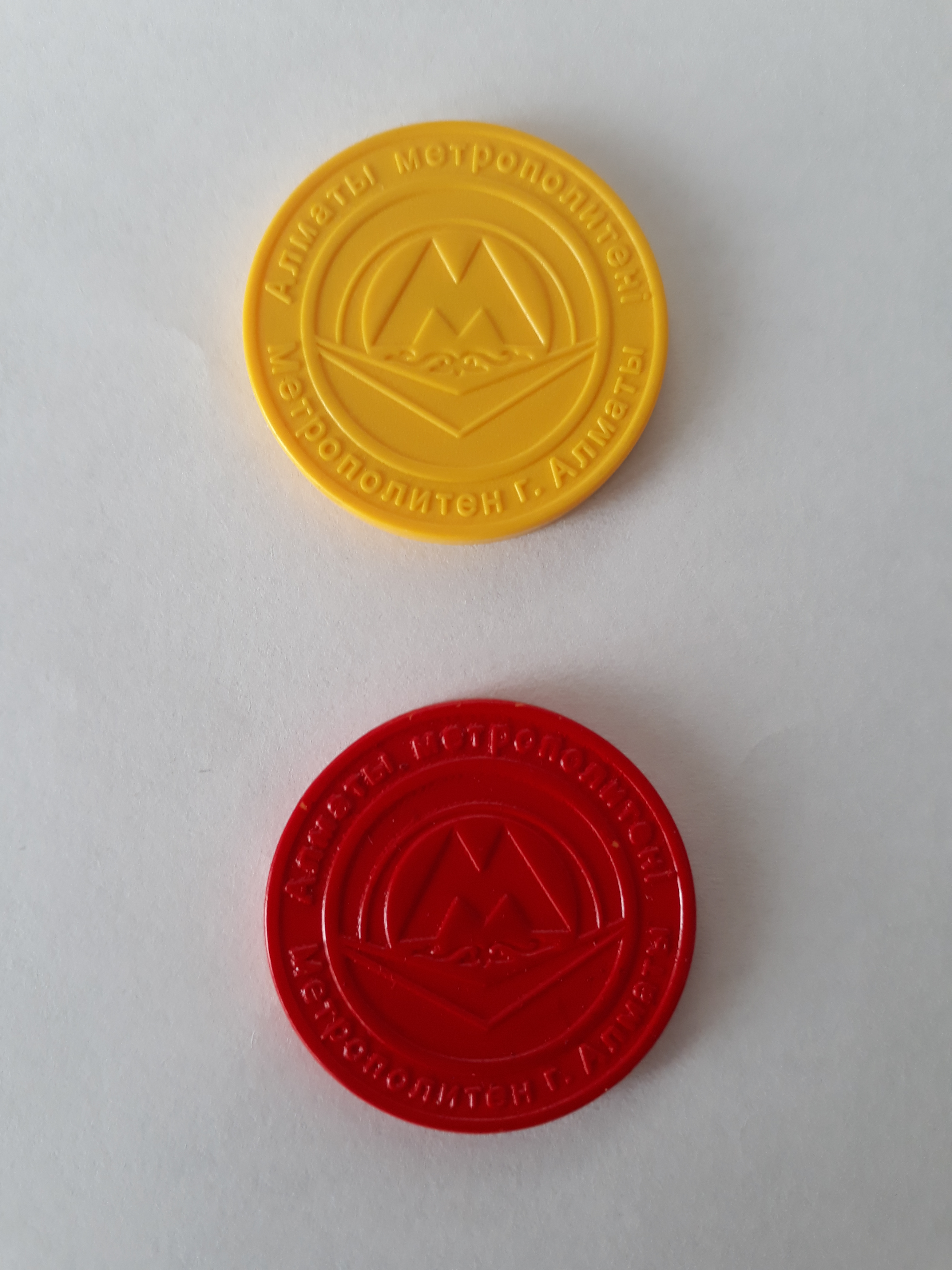 Жёлтый жетон - взрослый, красный жетон - детский